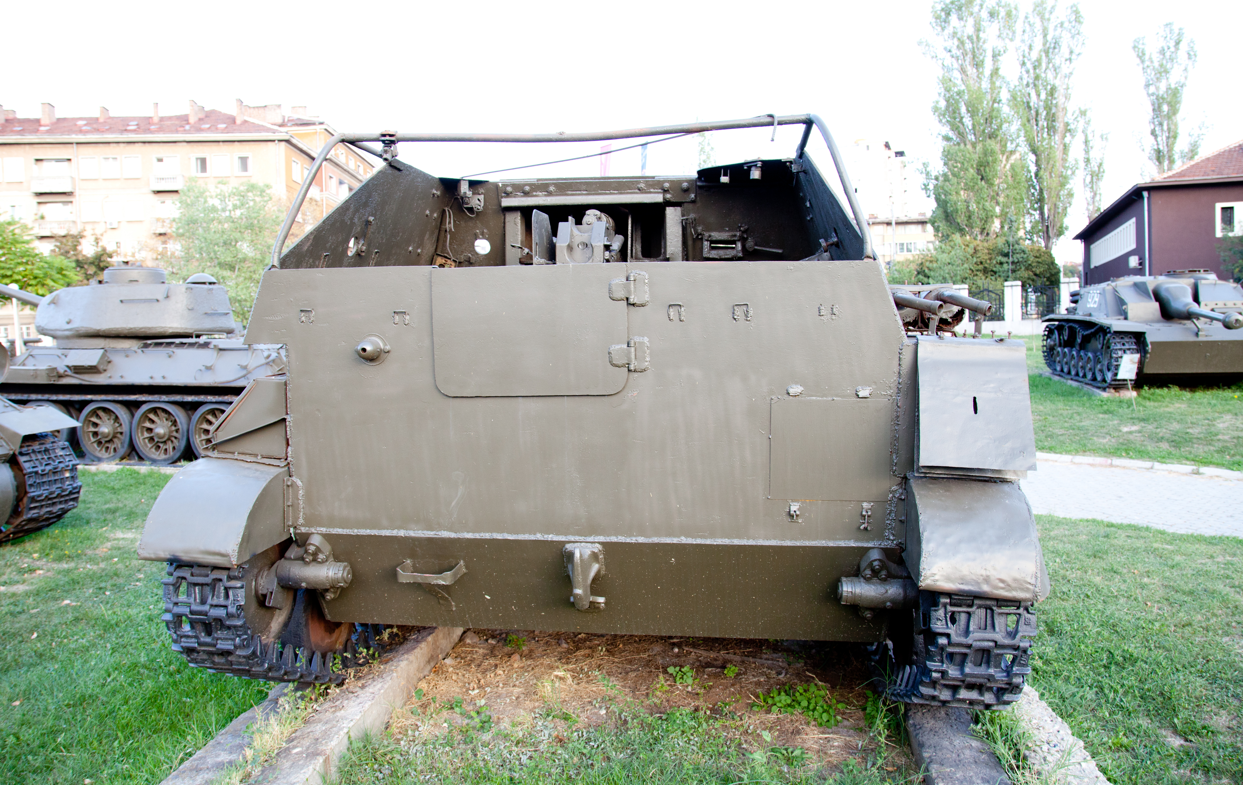 Sofia; der "Frauenmarkt" (Schenski pasar)